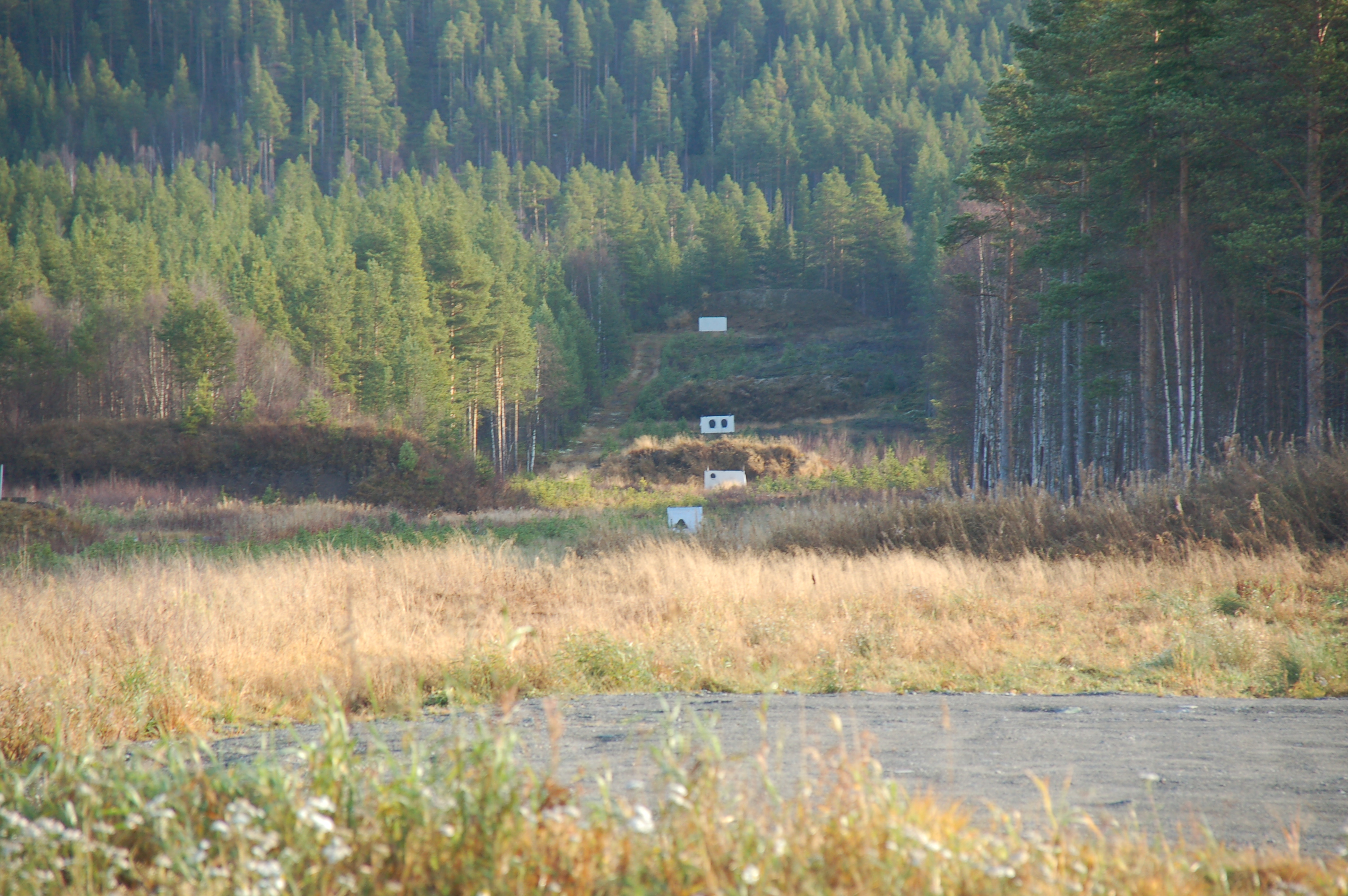 Tynset skytebane